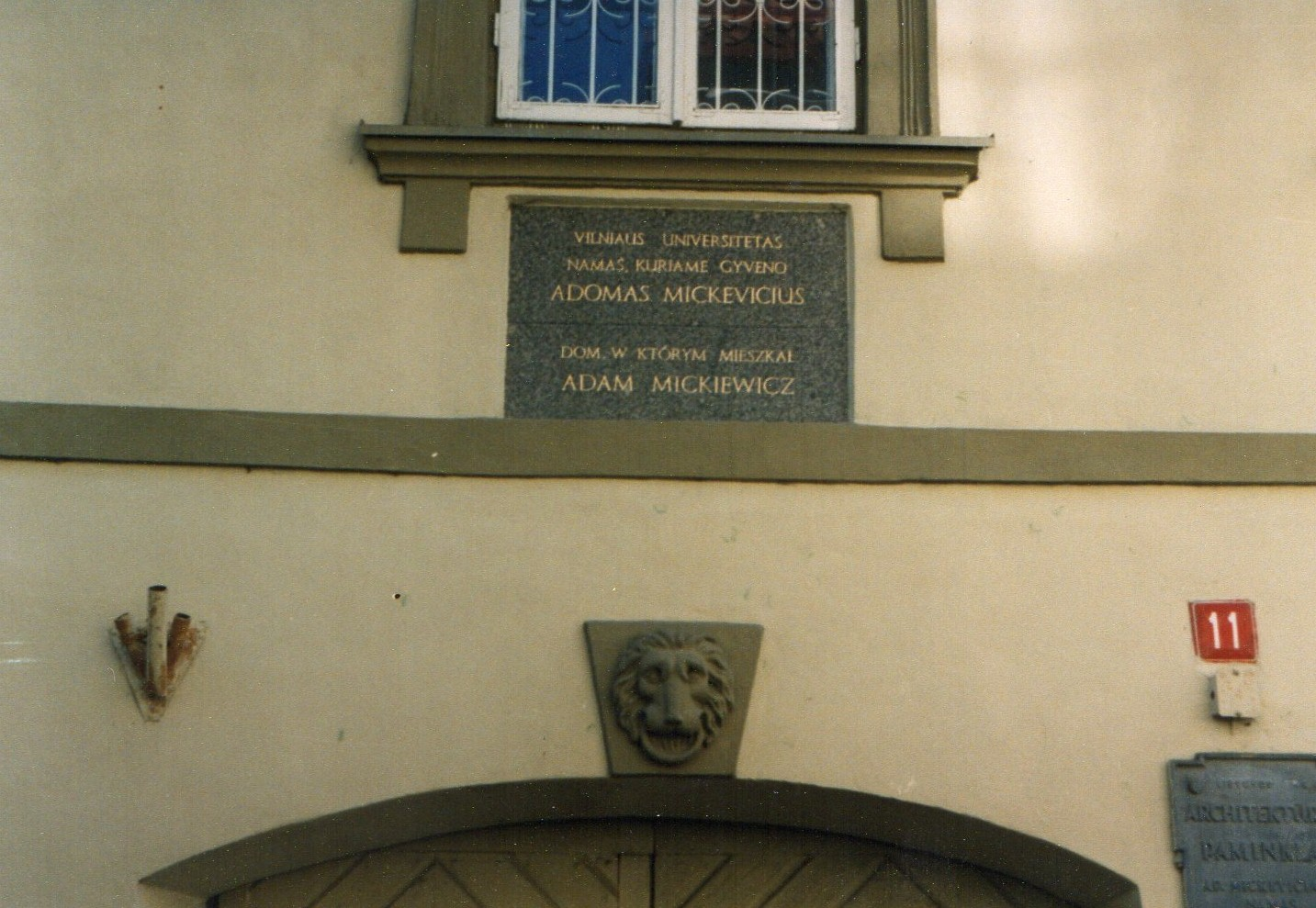 Tablica na Domu Mickiewicza w Wilnie.